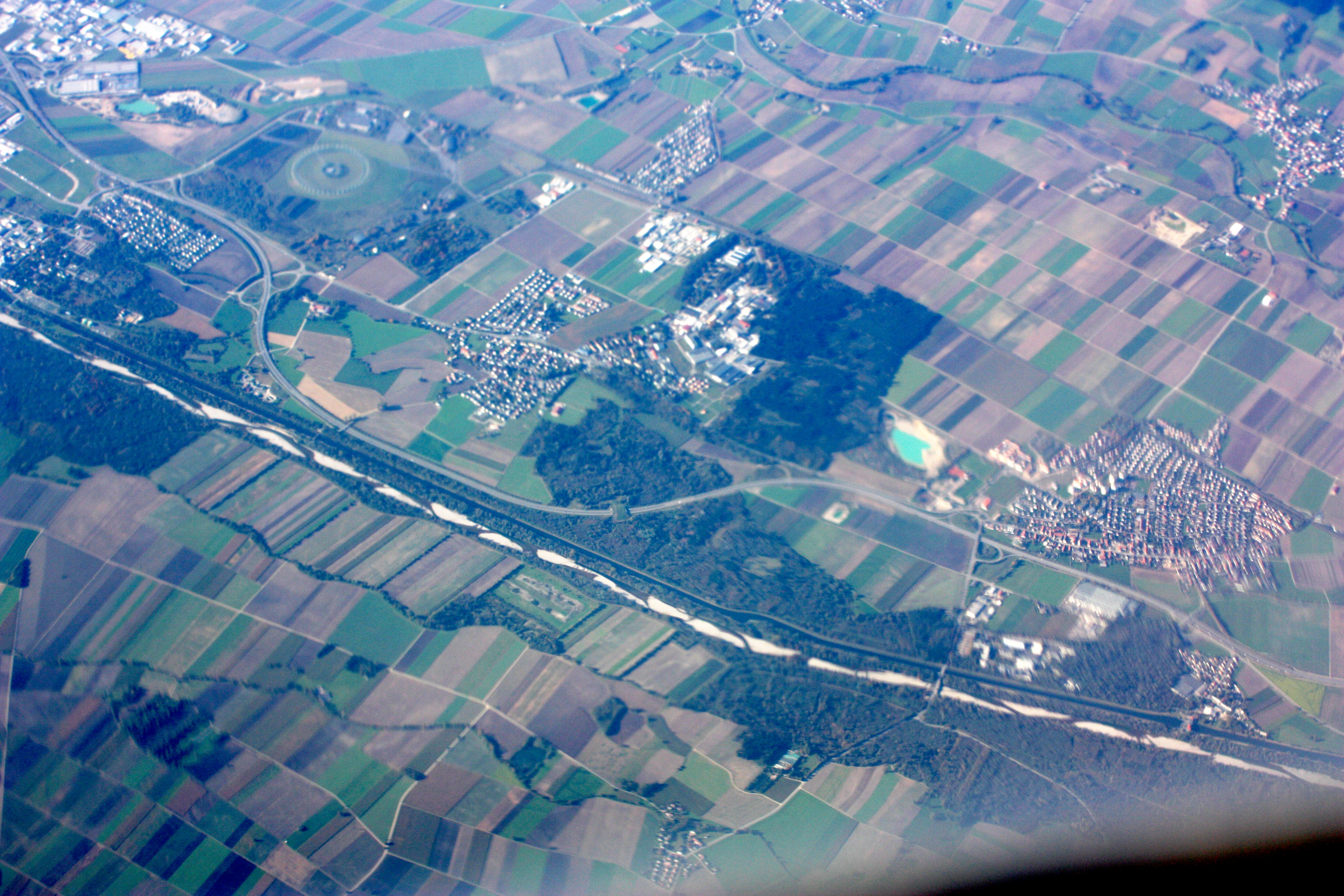 1 Flug von Frankfurt/Main nach Sofia; Start 10:12 MEZ; Landung 13:06 MEZ; Oktober 2010. v.l.n.R. die Abhöranlage Gablingen auf dem ehemaligen Flugplatz Gersthofen-Gablingen, Stettenhofen, Foret, Langweid am Lech